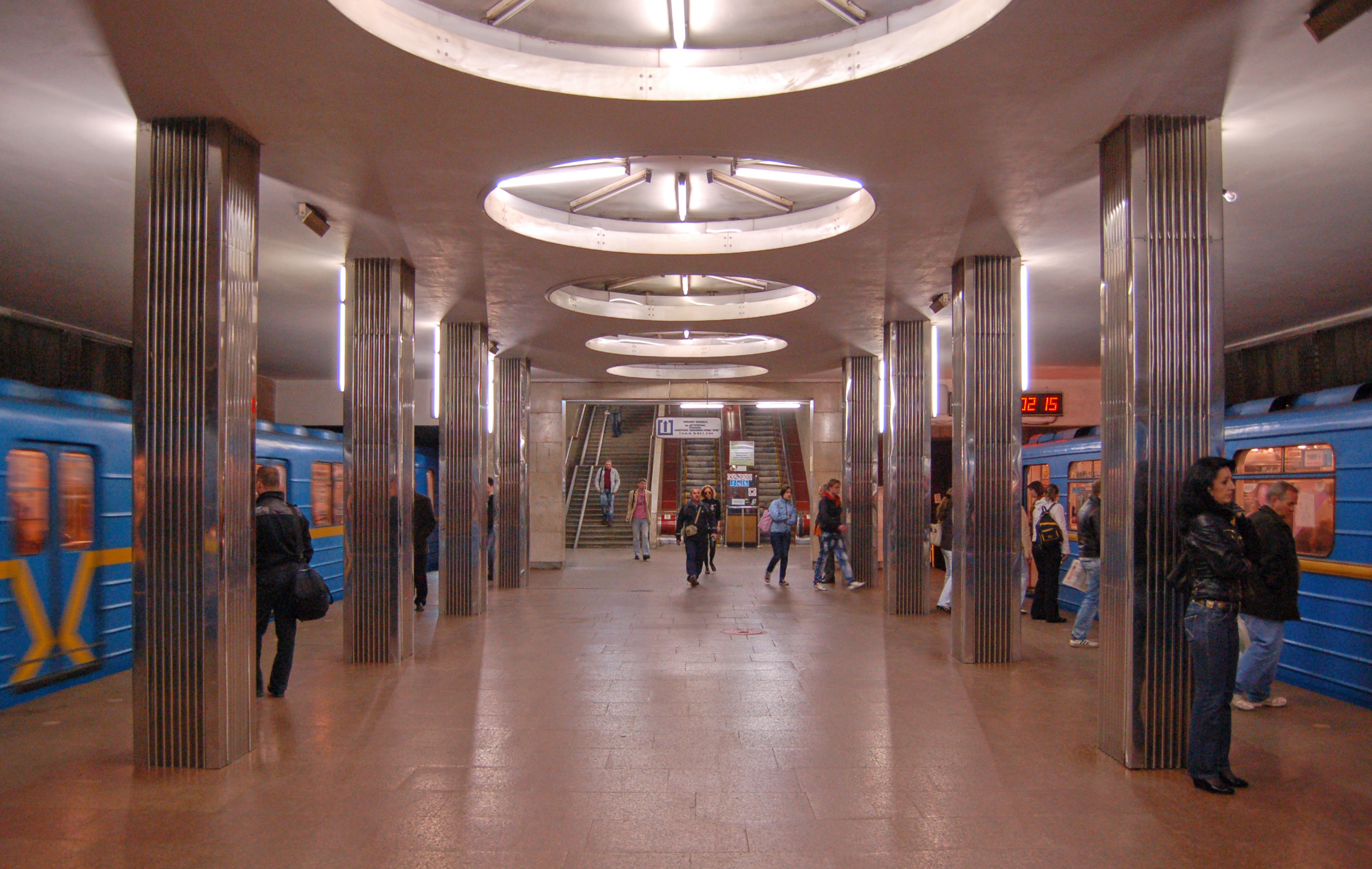 Станция метро «Берестейская», платформа, вид в сторону эскалаторов